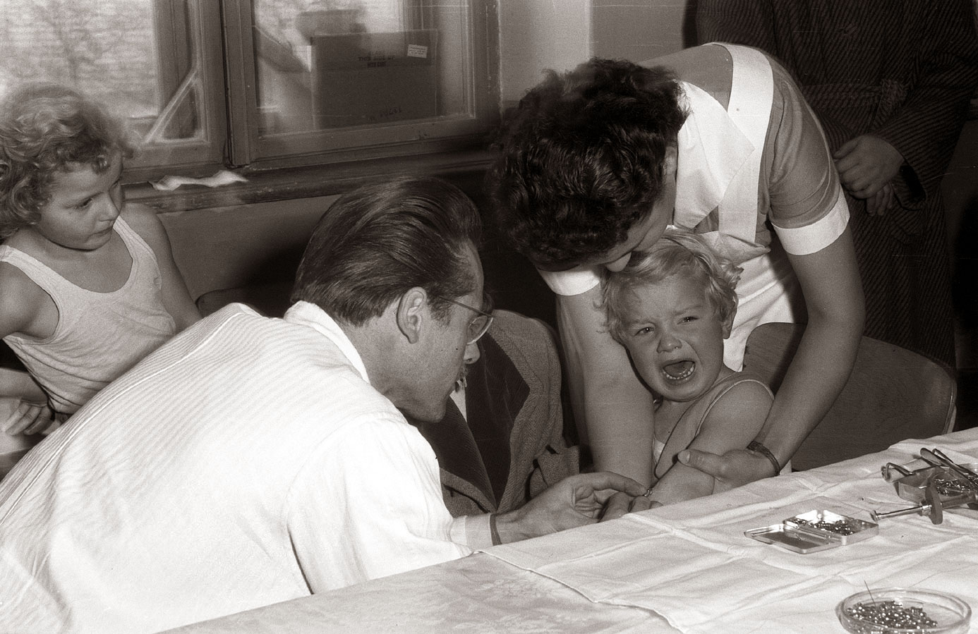 Cepljenje proti otroški paralizi v Mariboru